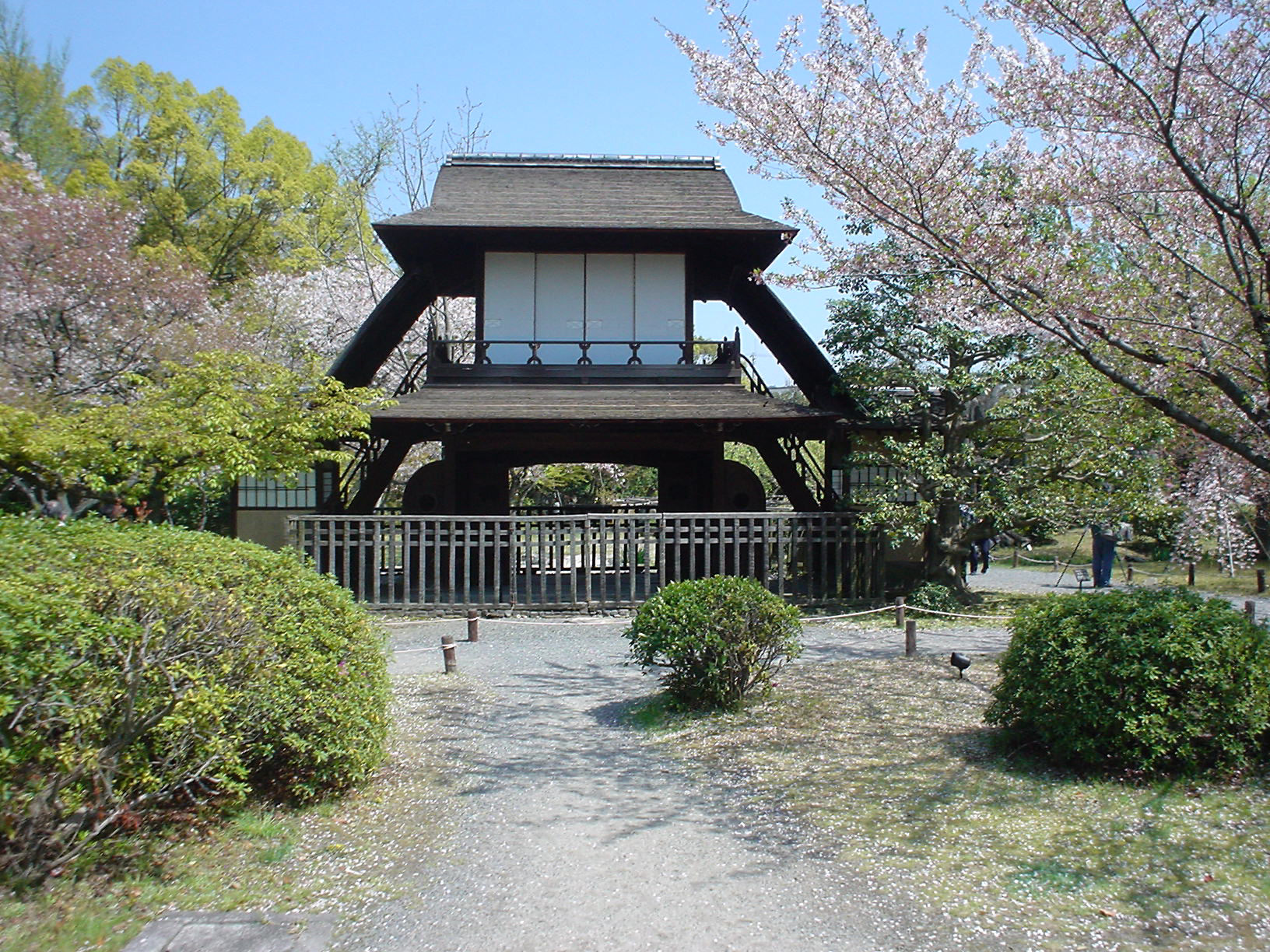 渉成園の傍花閣